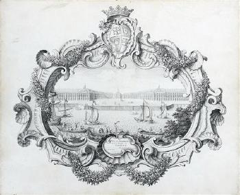 Vue en perspective de la place royale de Bordeaux, dessin à l'encre de 1737 par Alexandre Antoine Marolles dédié à Claude Boucher, intendant.